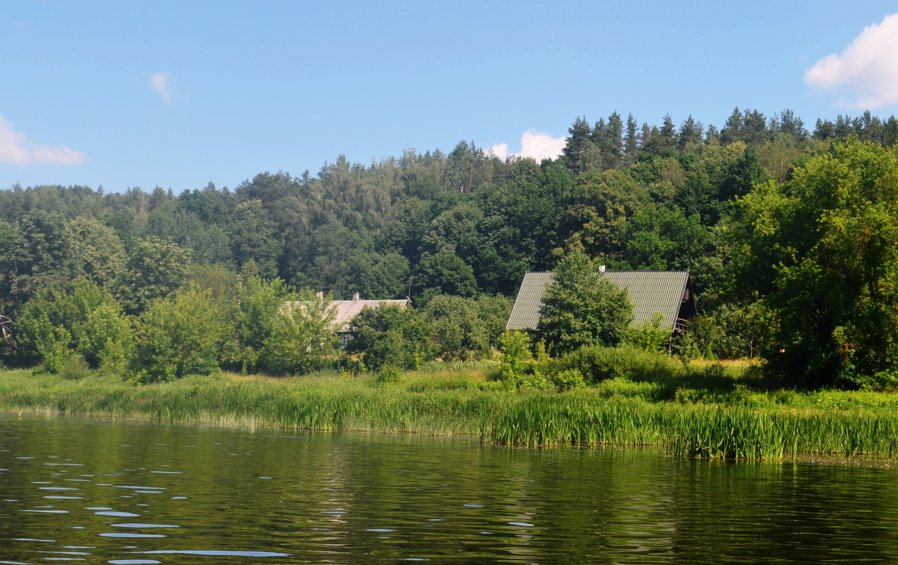 Karmazinai, Vilniaus raj.